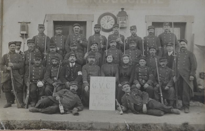 Cliché pris en août 1914, à la gare de La Houssière (Vosges), de soldats territoriaux du 43e régiment d'infanterie territoriale (RIT) faisant partie des Gardes de Voies et Communications.